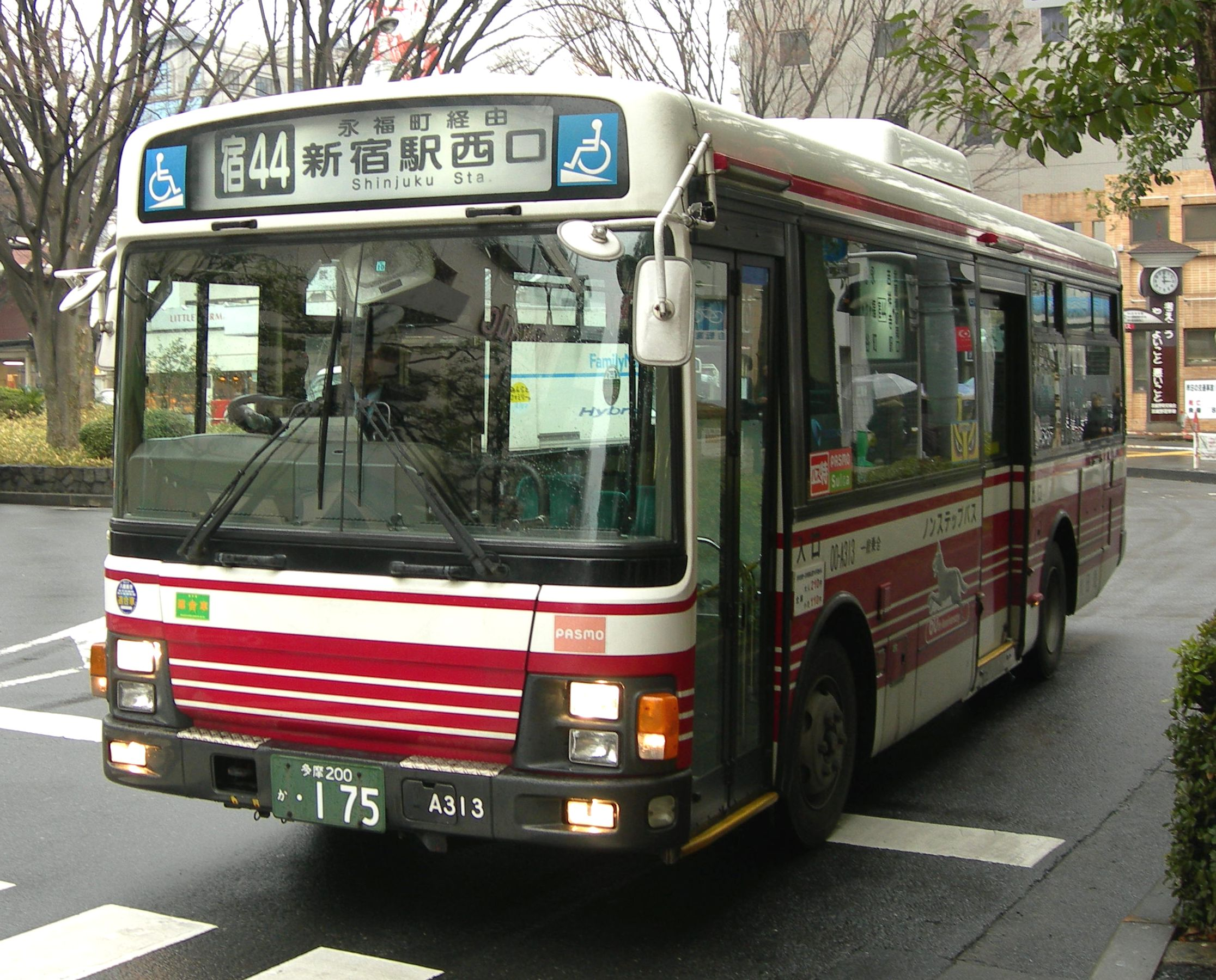 小田急バス吉祥寺営業所 路線バス